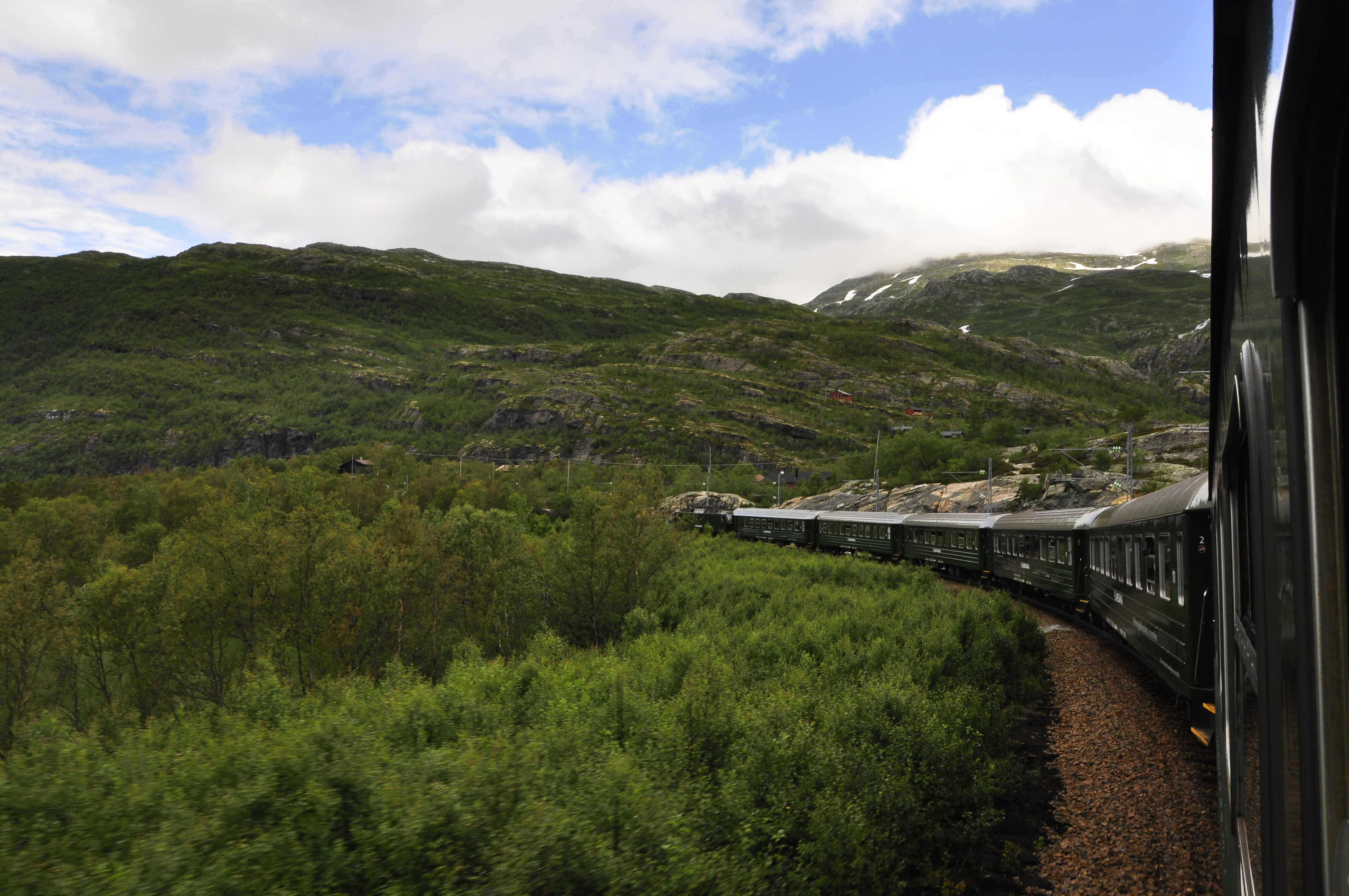 Flåmsbana